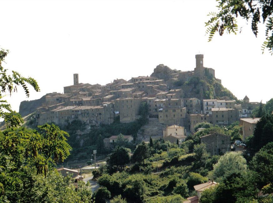 descrizione: veduta di Roccatederighi (GR) Lavoro personale di Vinattieri Matteo che lascia in pubblico dominio il 27/01/2007; foto scattata nel luglio 2005 da apparecchio non digitale e rielaborata successivamente.